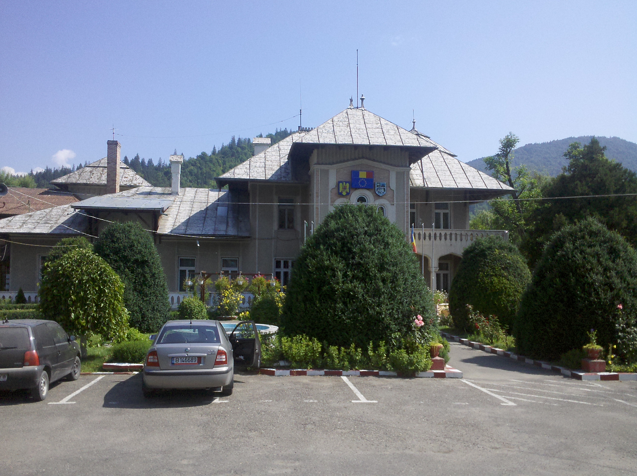 Ajuntament de Bicaz, Neamţ